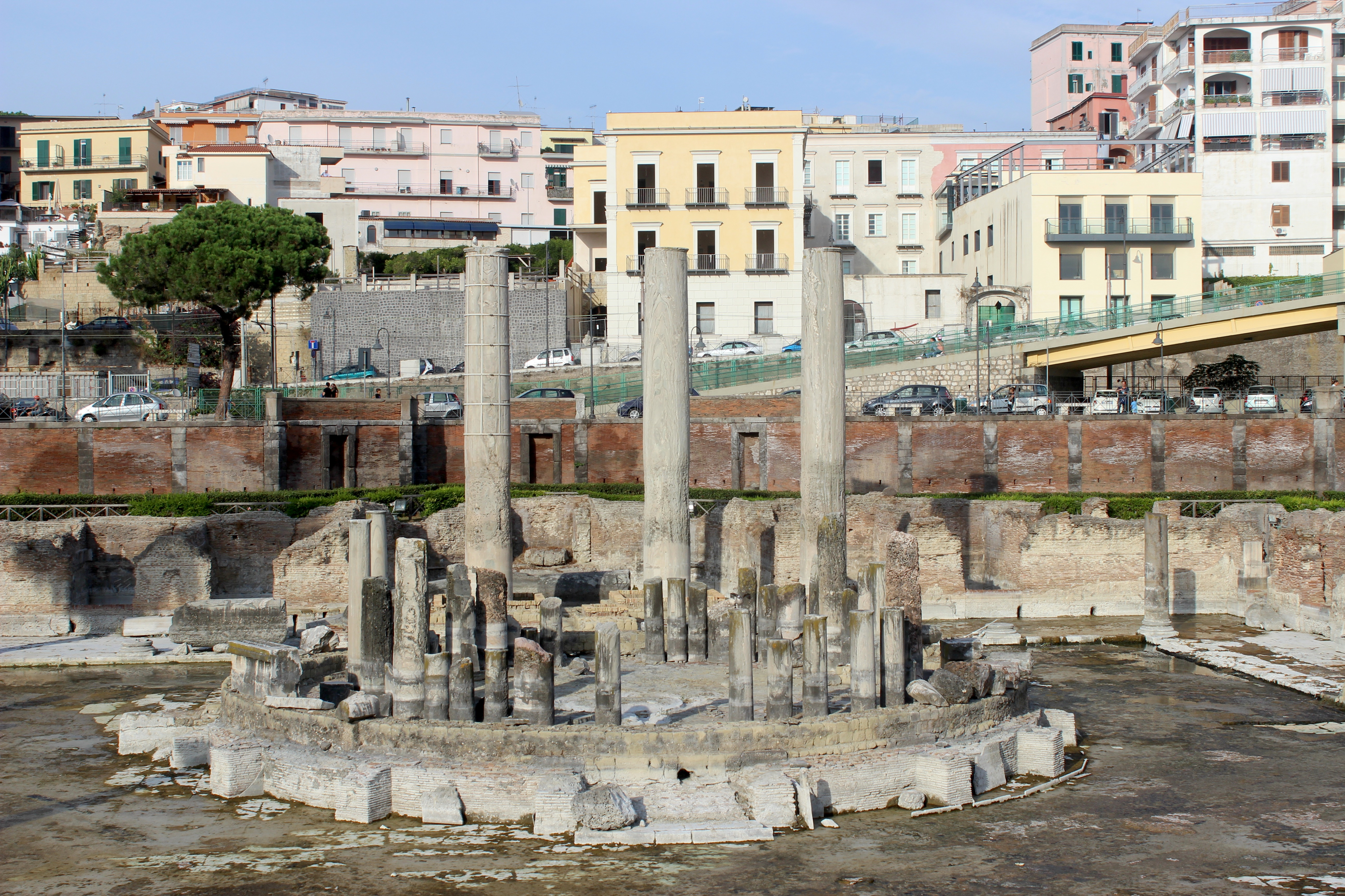 Pozzuoli. Macellum.